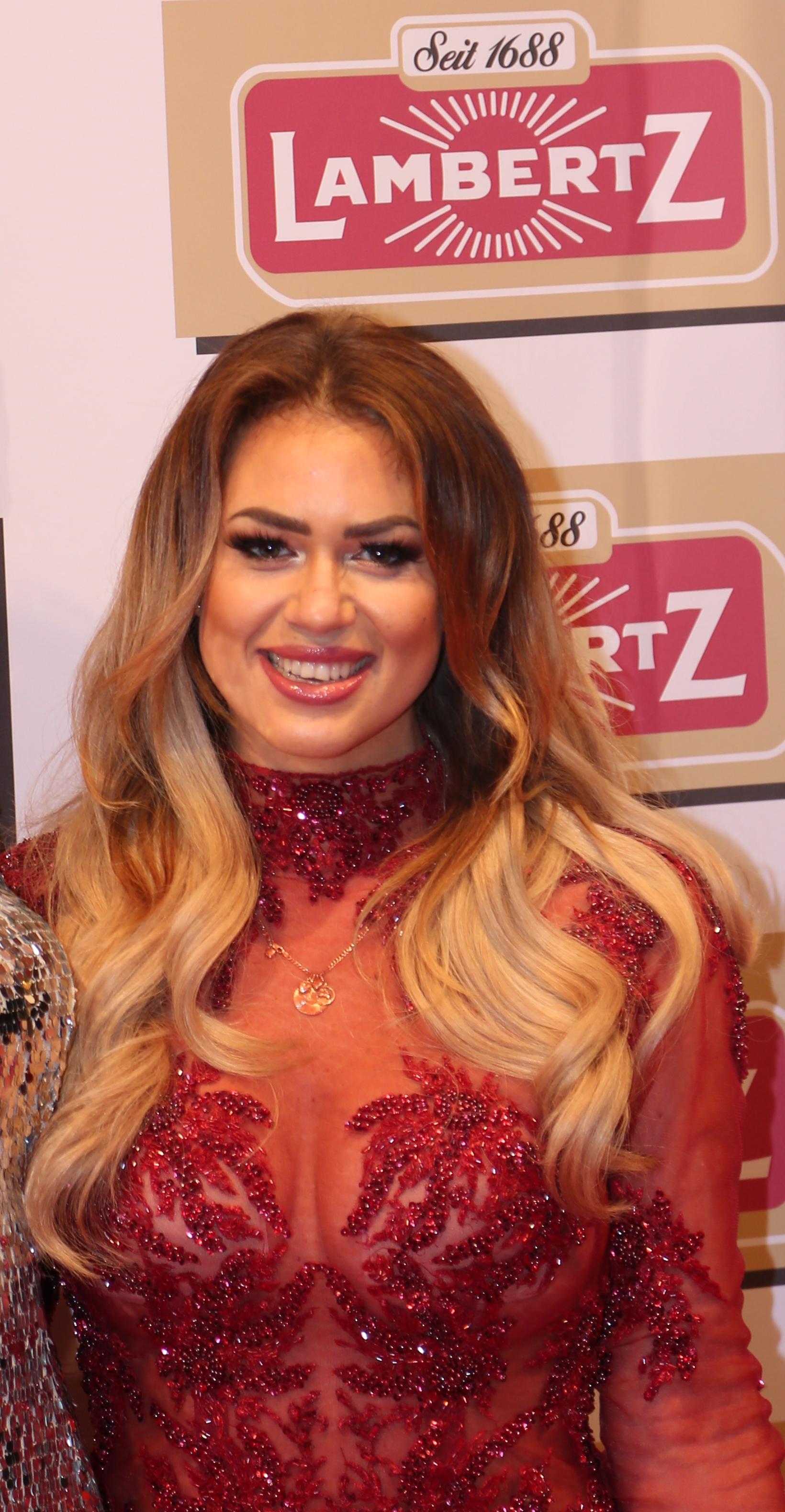 Jessica Paszka bei der Lambertz Monday Night 2017.